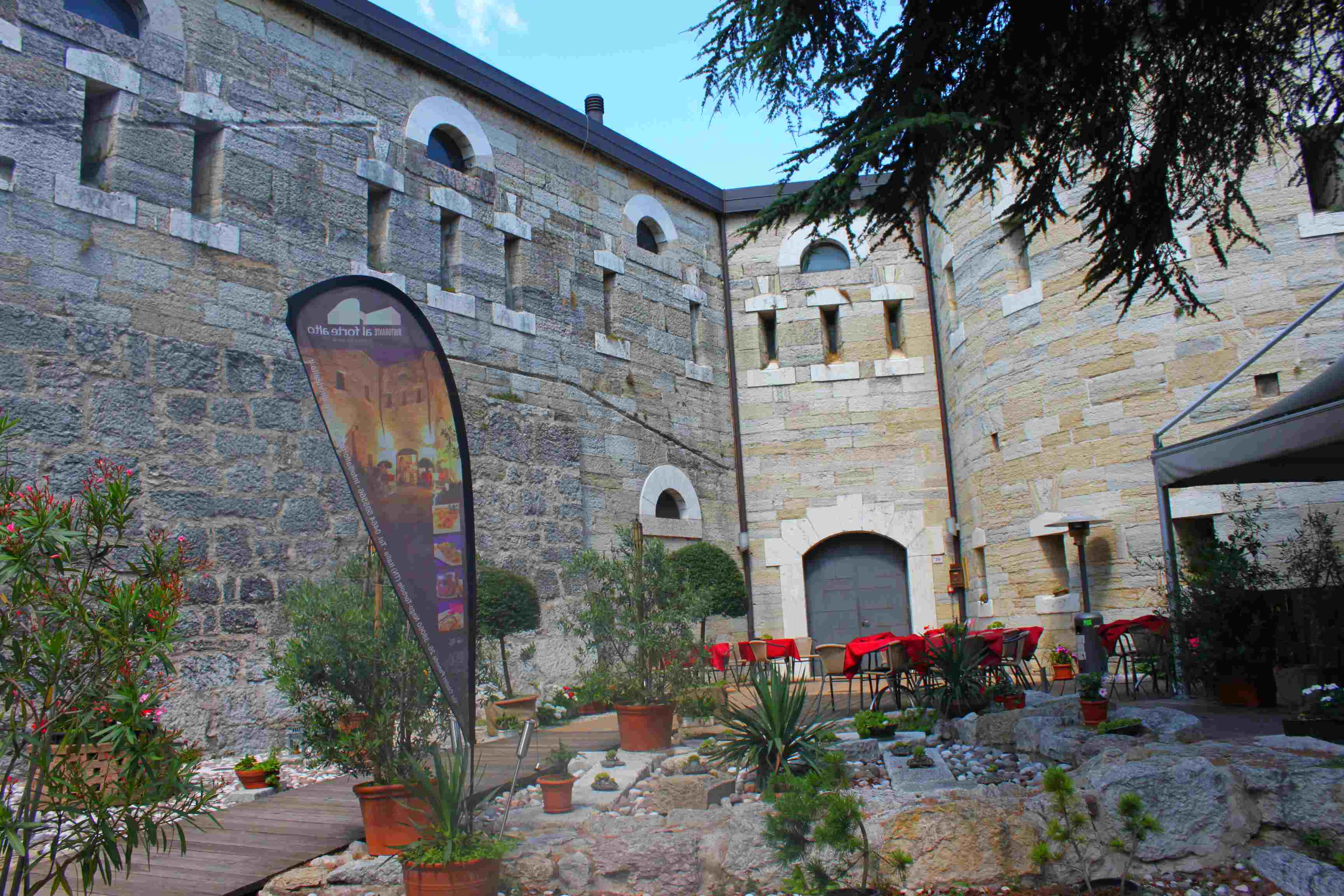 Ristorante Al Forte Alto in Nago, in einer alten Wehranlage mit gutem Blick über den Gardasee